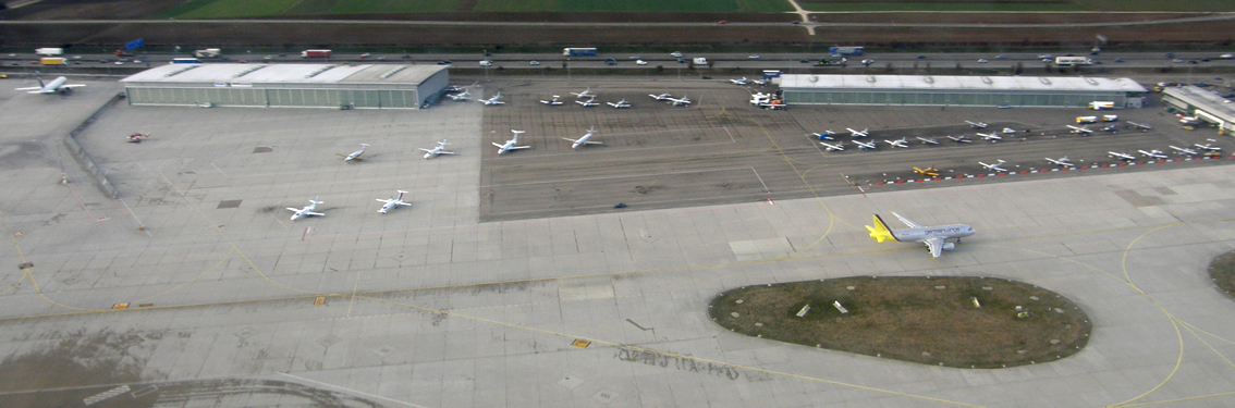 Der Stuttgarter Flughafen aus der Luft